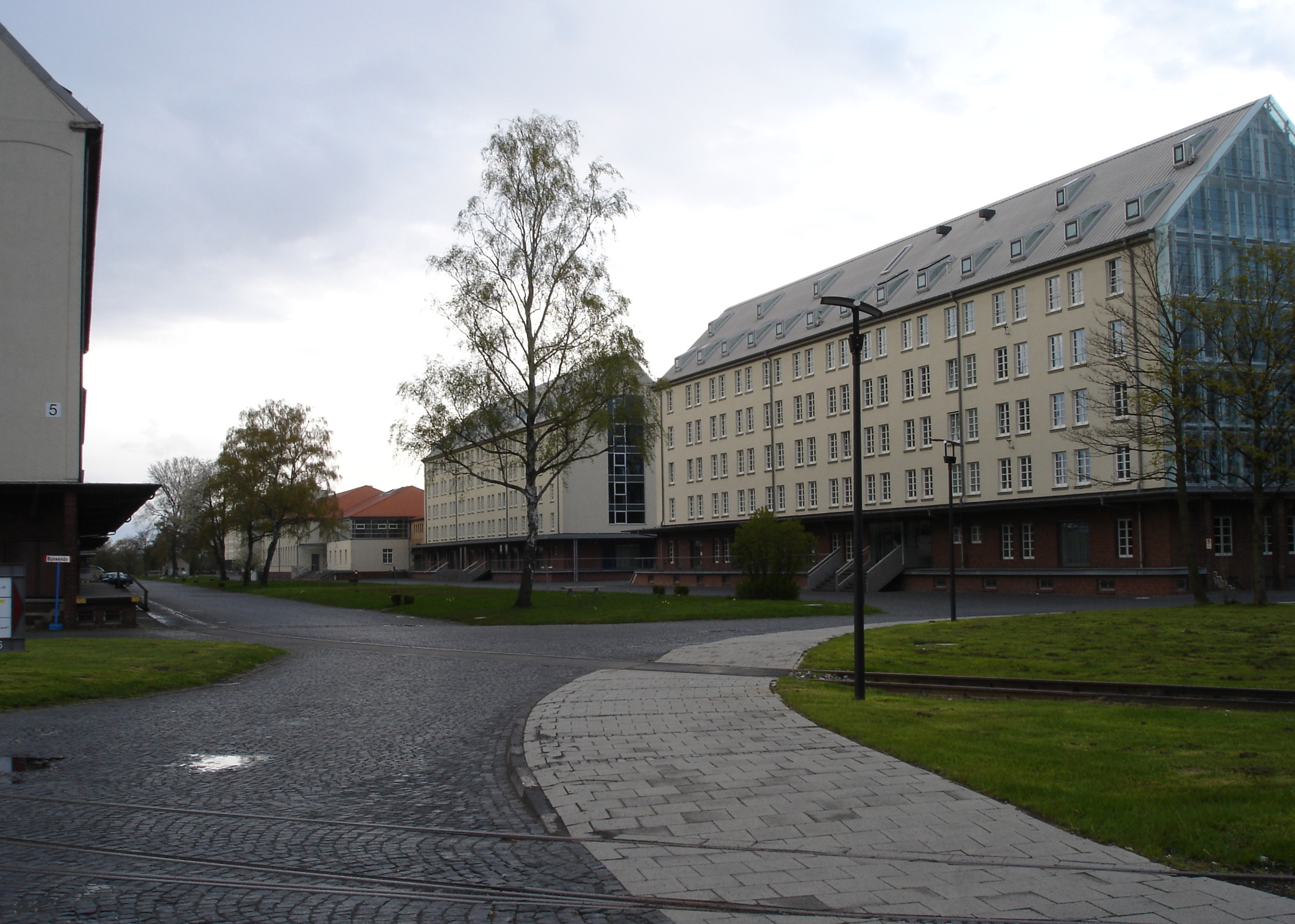 View in north direction in the "Speicherstadt" (granery) in Münster, Westphalia, Germany